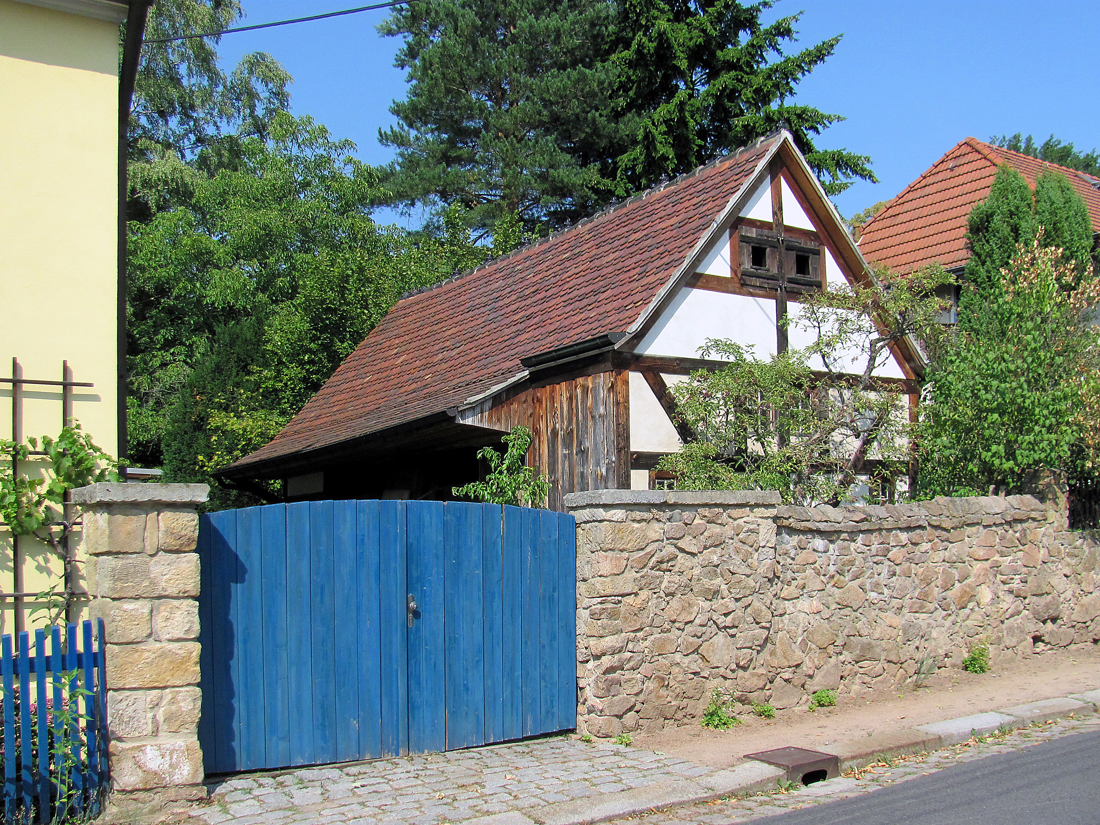 Radebeul-Oberlößnitz, Nebengebäude von Haus Eisold